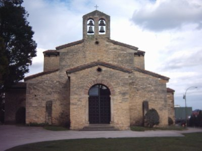 Ilesia de Santullano n'Uviéu, Asturies. En castellán nomada como San Julián de Los Prados. Ye una amuesa del prerrománicu asturianu.